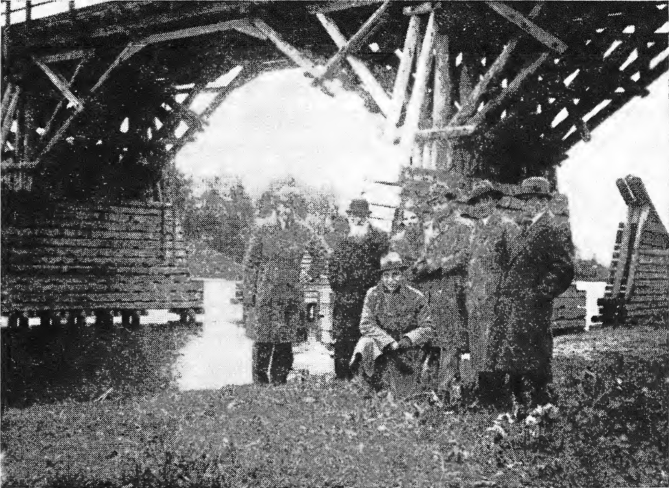 Беларуская (тарашкевіца): Беліца (Bielica), мост цераз раку Нёман (Nioman)